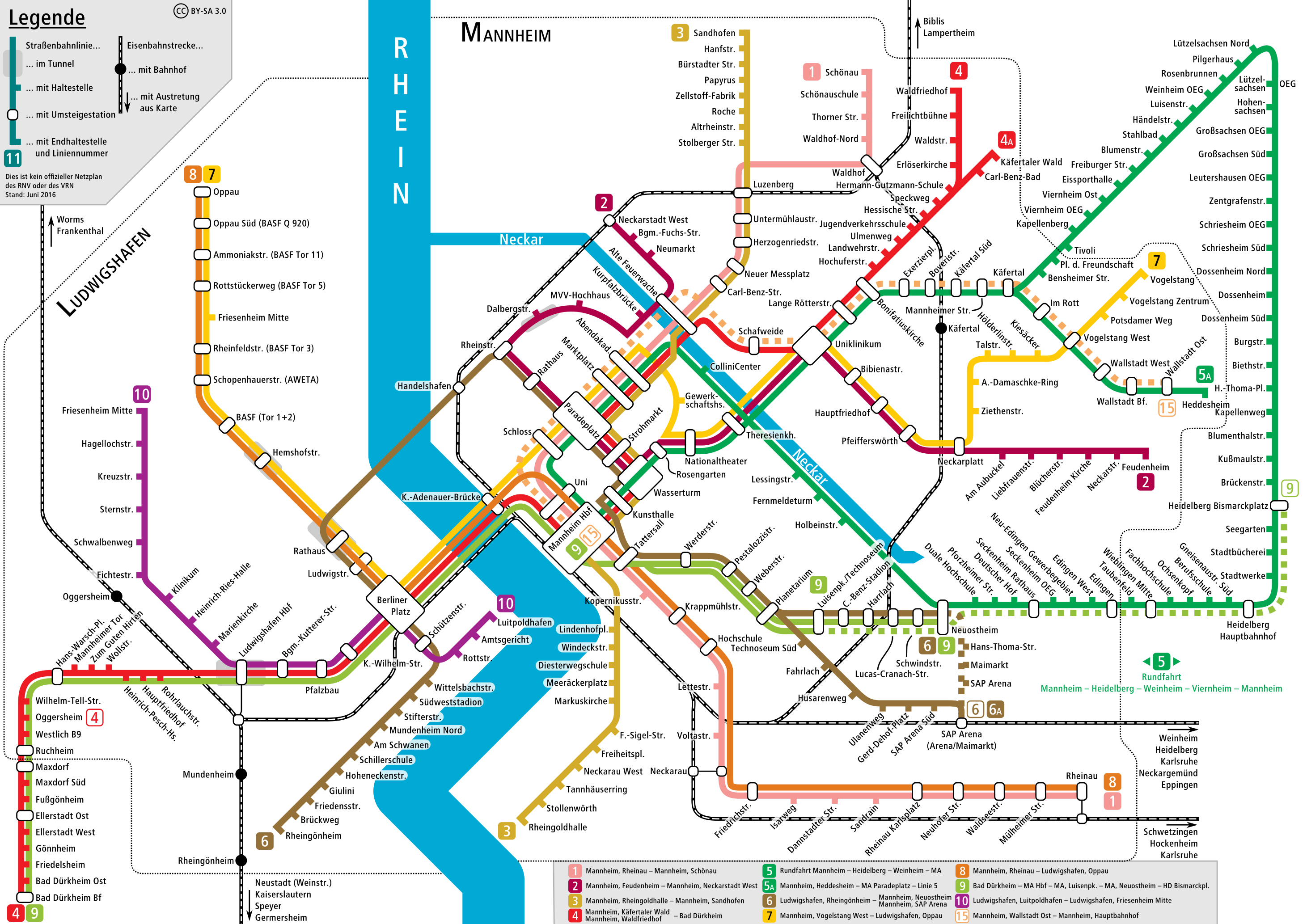 Netzplan der Mannheim/Ludwigshafener Straßenbahn inklusive OEG und RHB